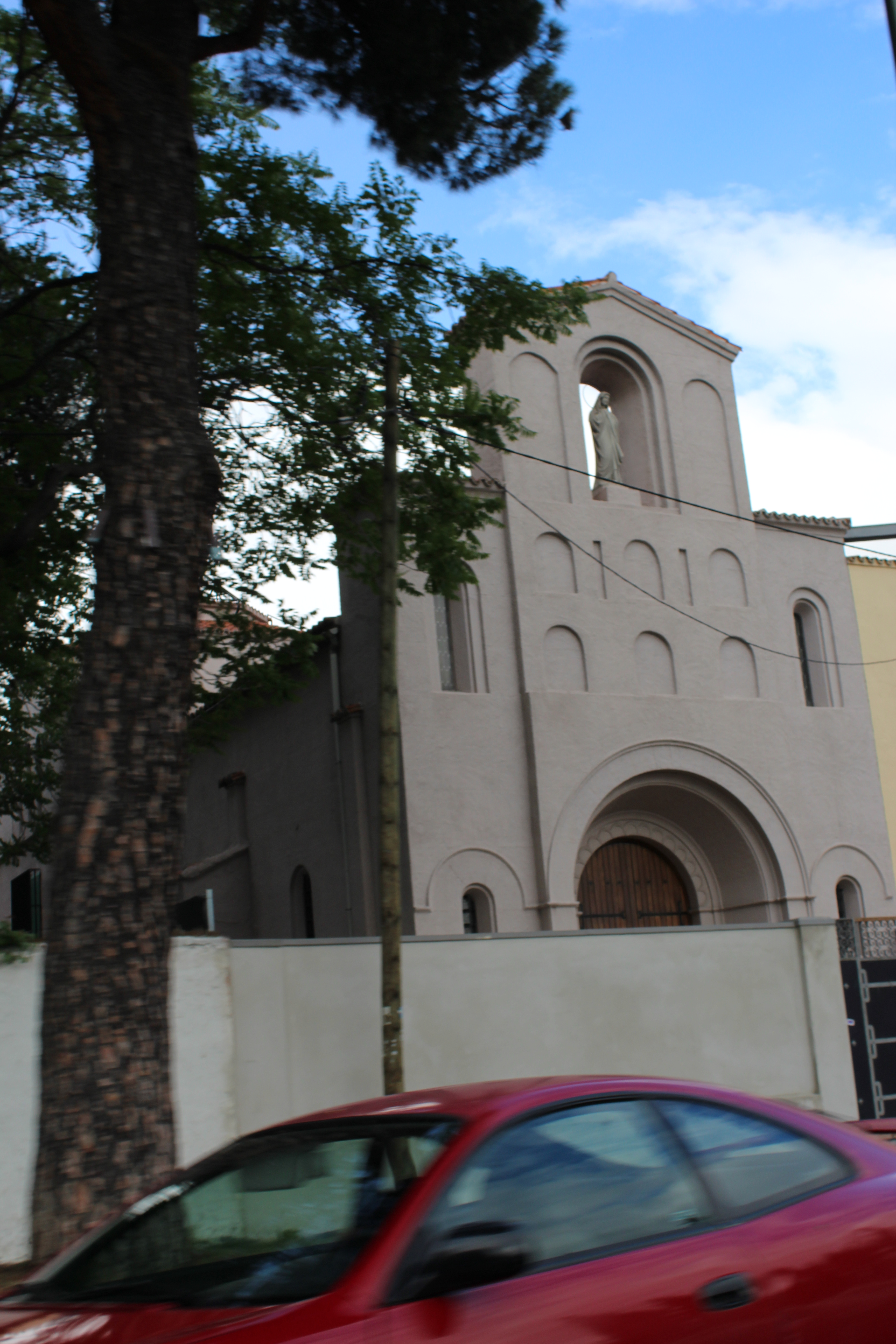 Iglesia de las Siervas de Santa María, Madrid.